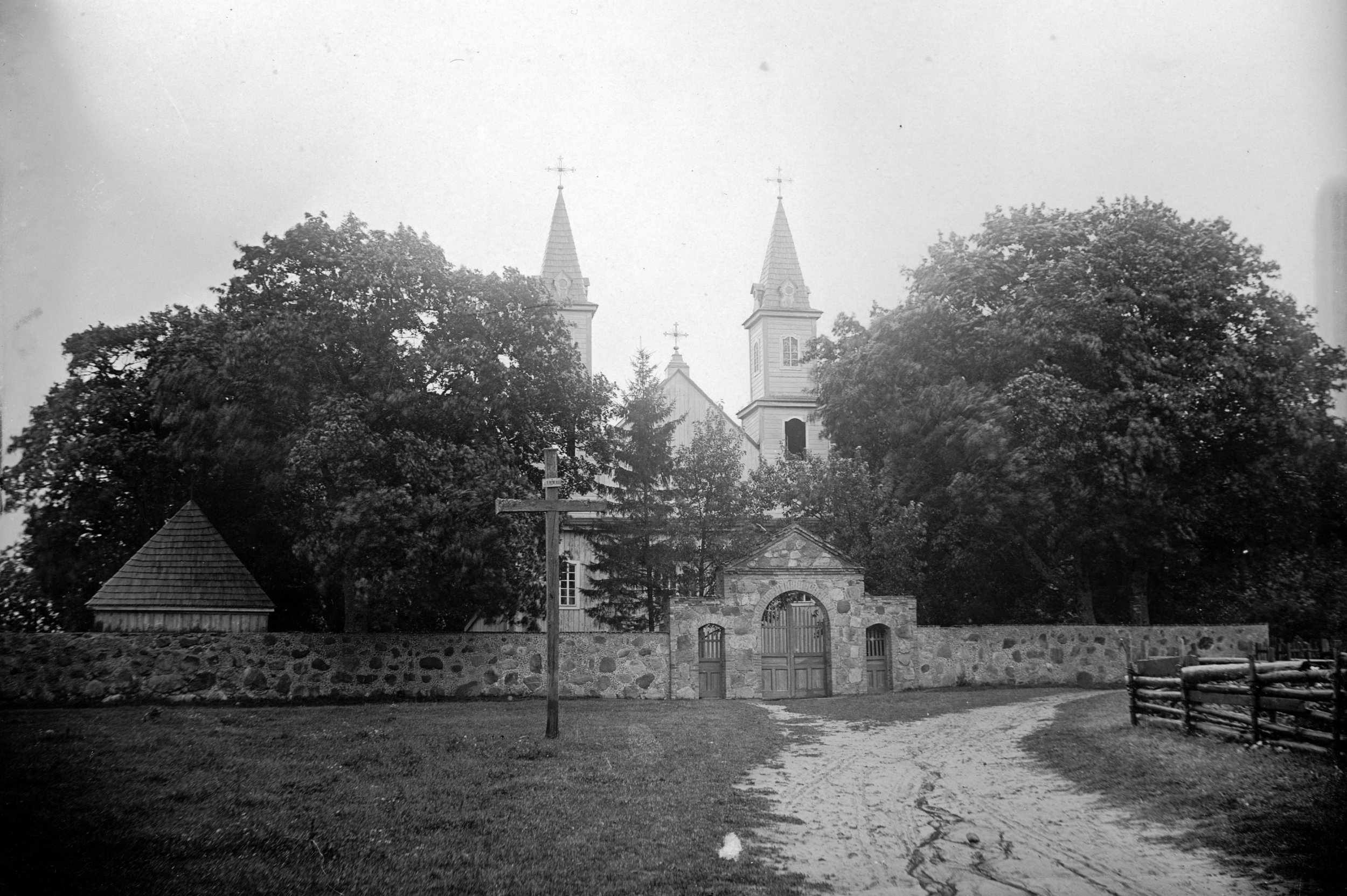 Беларуская (тарашкевіца): Палачаны (Pałačany), урочышча Аборак (Aborak). Касьцёл Унебаўзяцьця Найсьвяцейшай Панны Марыі і Сьвятога Роха